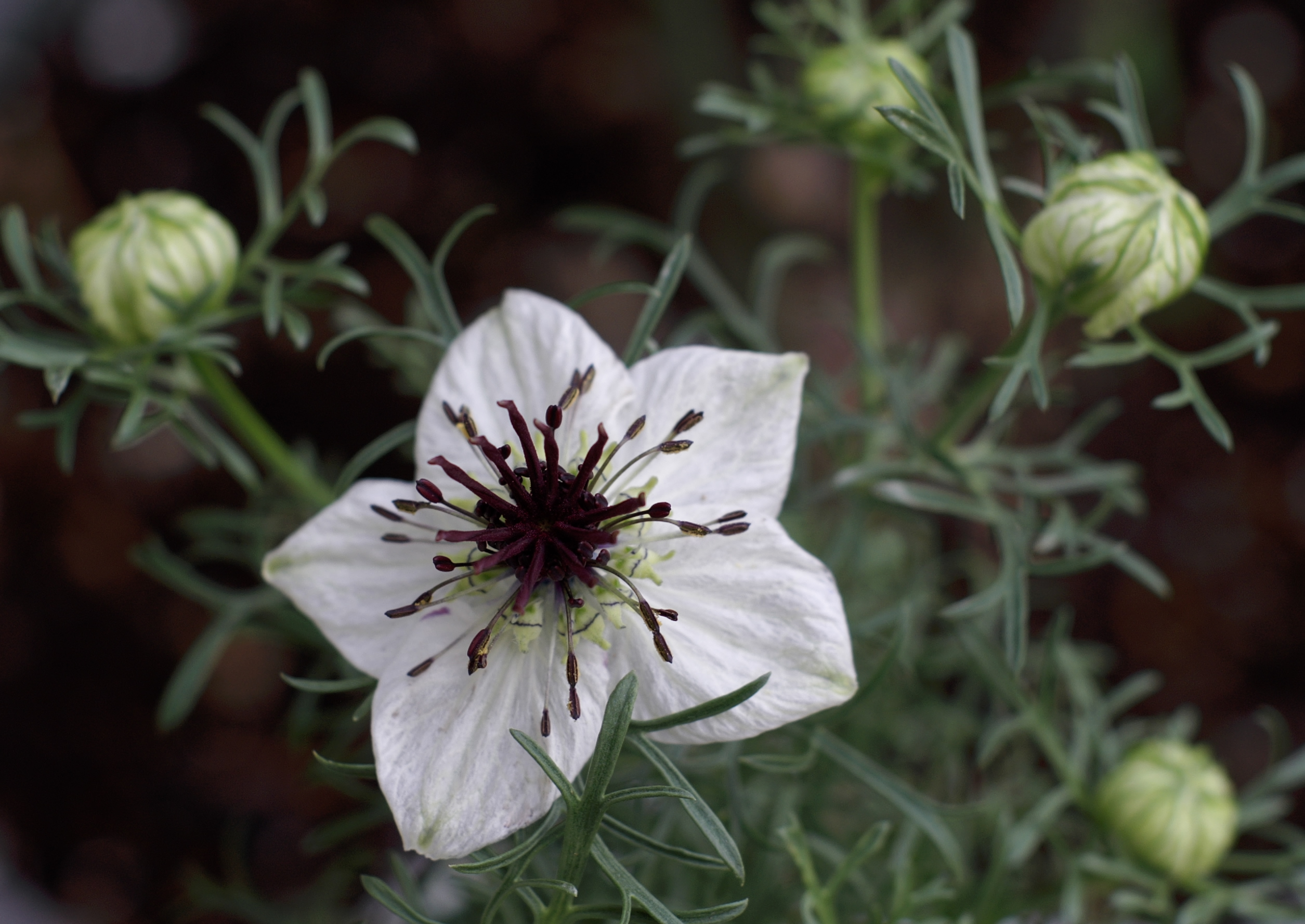 Kinoptik Paris - 1/2 F=75mm